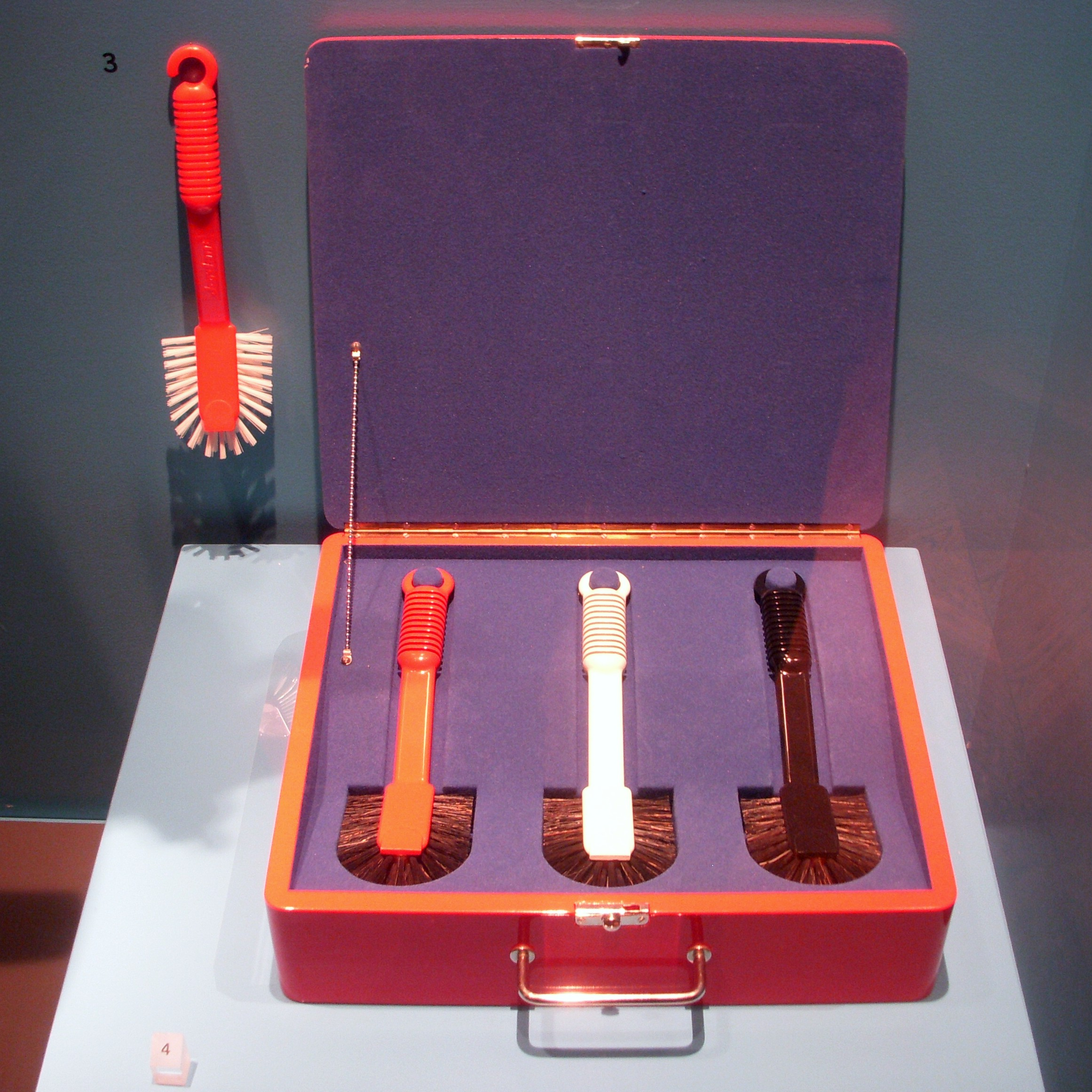 Nationalmuseum, avdelning "Modern form", A&E:s diskborste